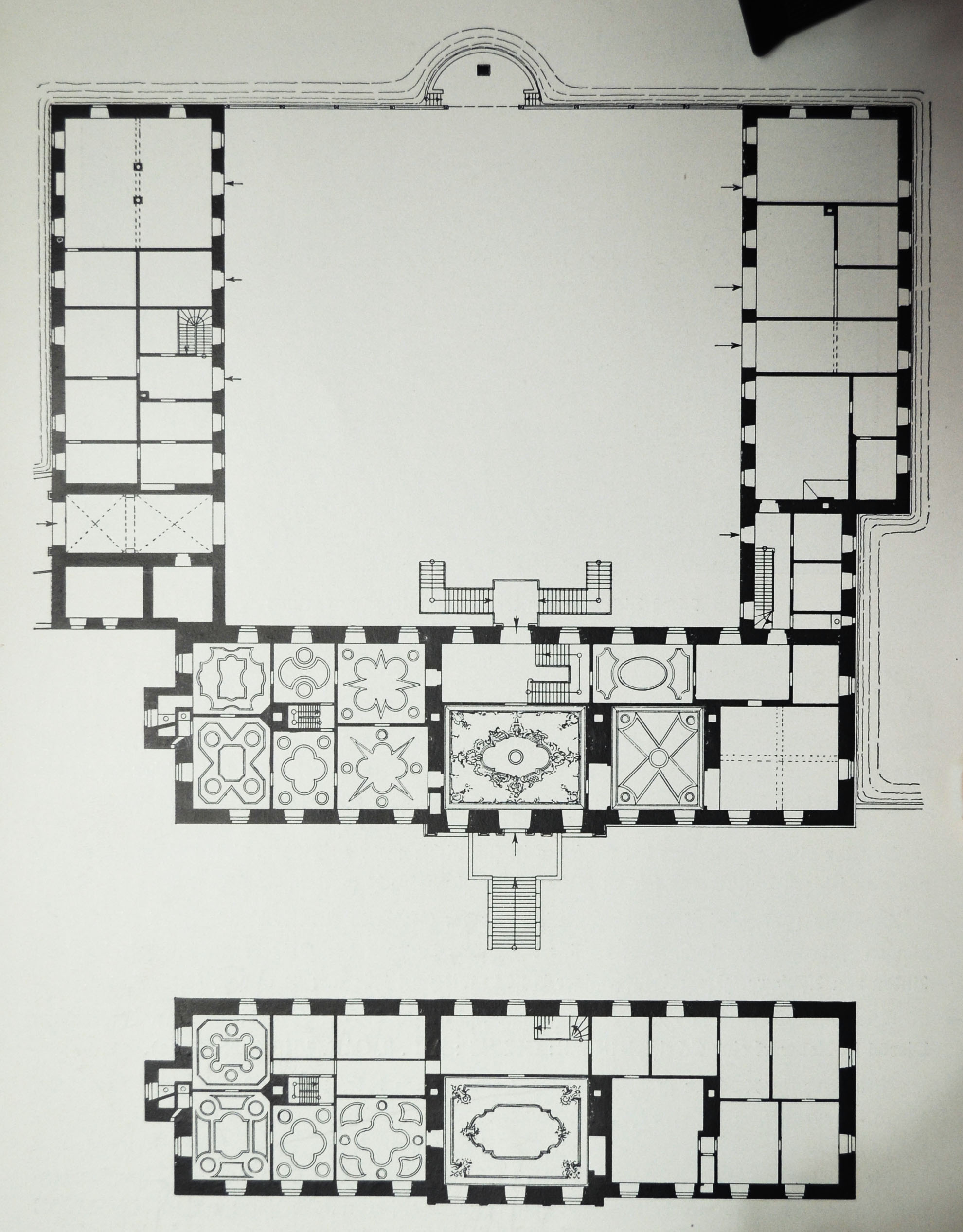 Alme Schloß Niederalme, Erd- und Obergeschoß, Zeichnung ohne Schöpfungshöhe